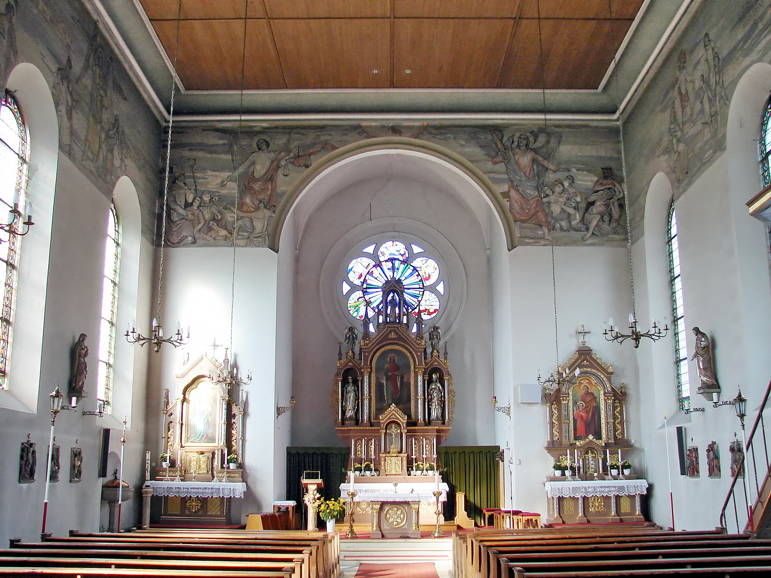 Katholische Pfarrkirche, neuromanischer Saalbau, errichtet nach Plänen Friedrich v. Gärtners, 1832-35; mit Ausstattung.